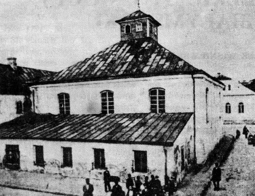 Old Synagogue in Białystok